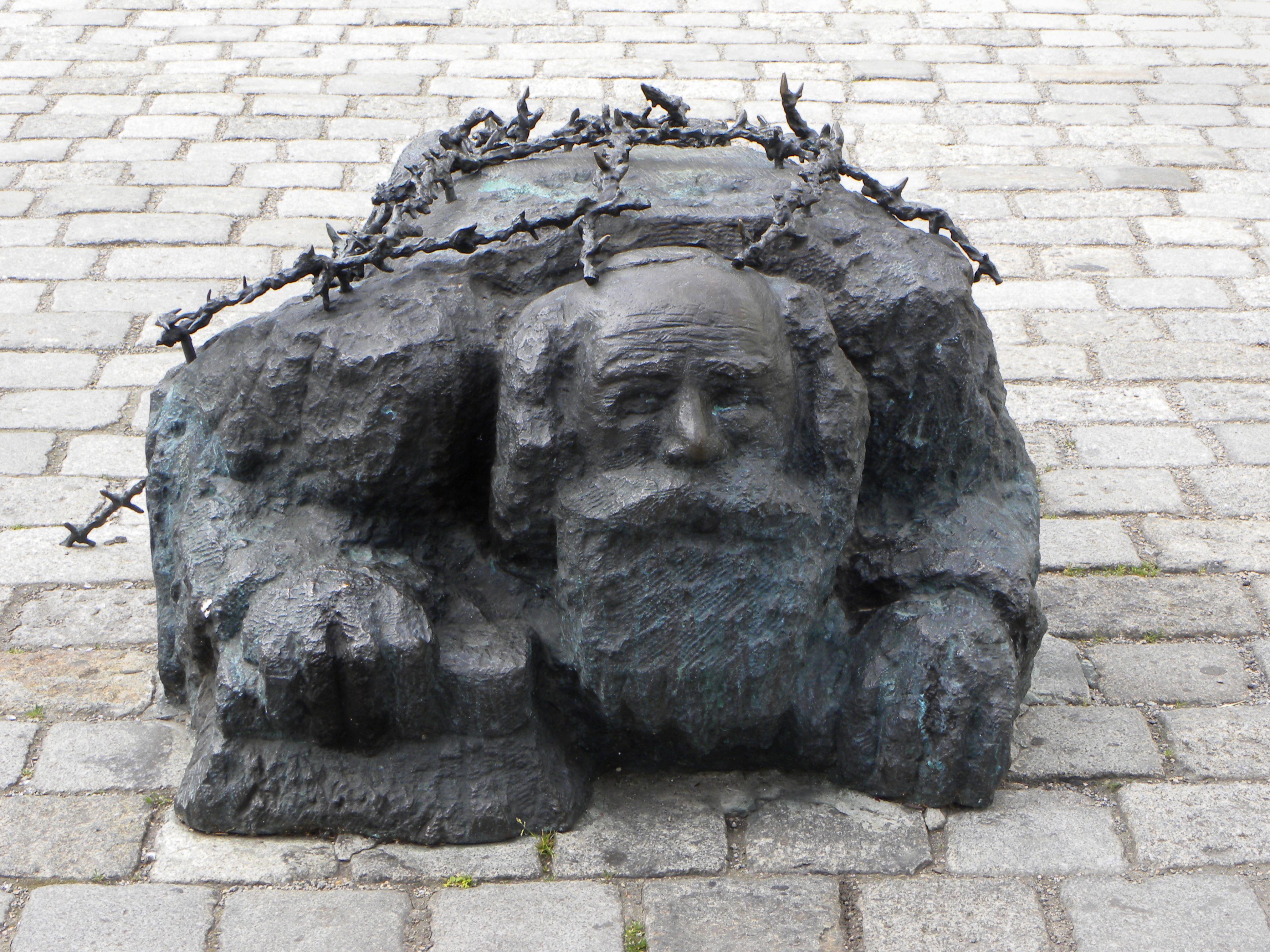 Denkmal gegen Krieg und Faschismus